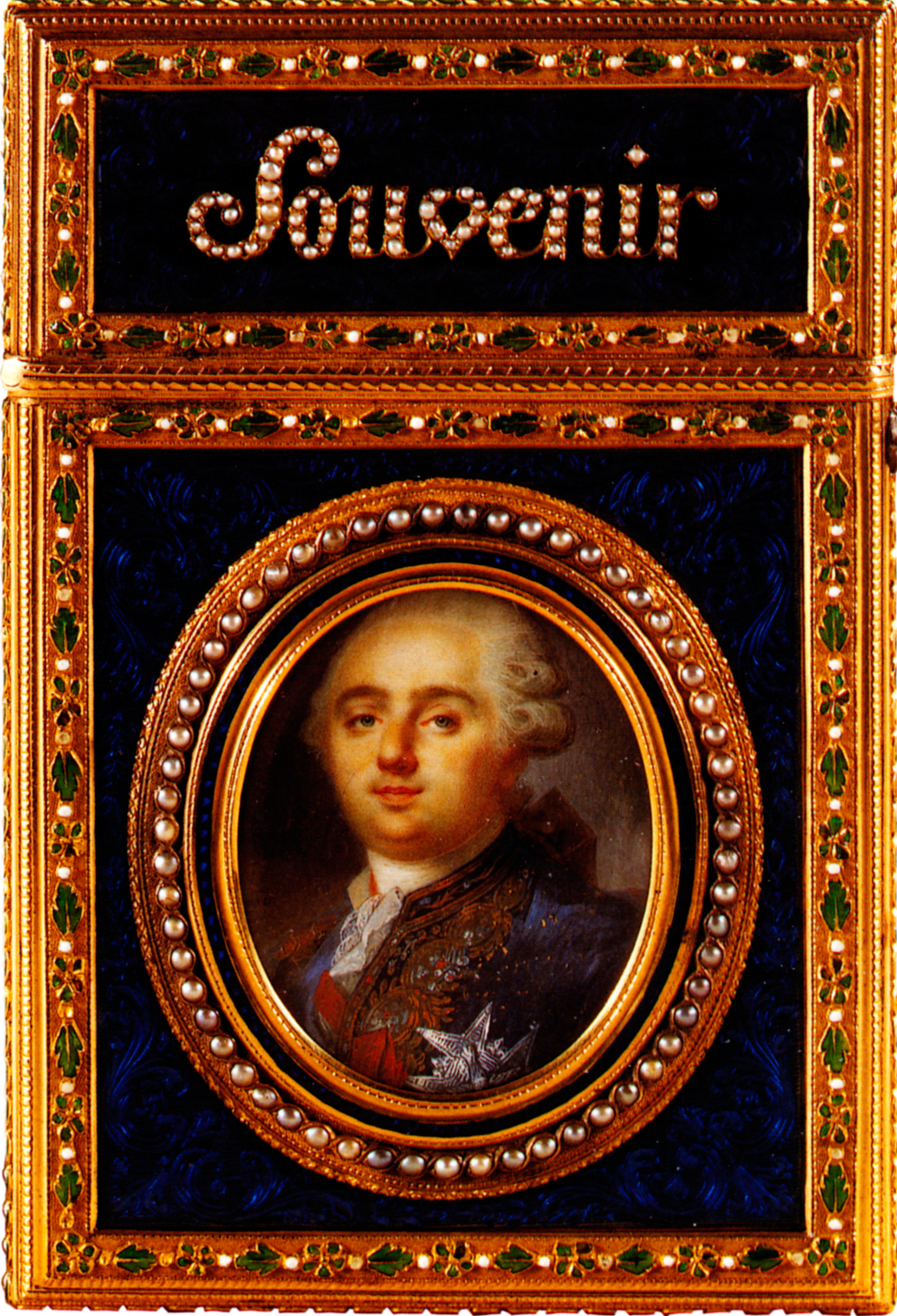 Carnet de bal (Notizbüchlein als Ballspende)